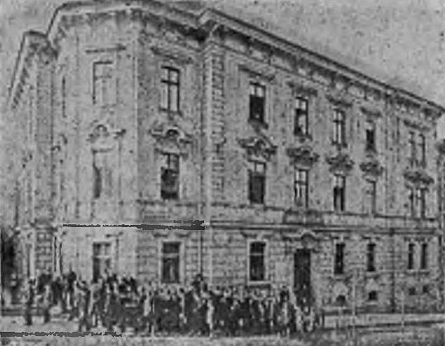 Budynek Polskiego Gimnazjum w Cieszynie (przed 1901)